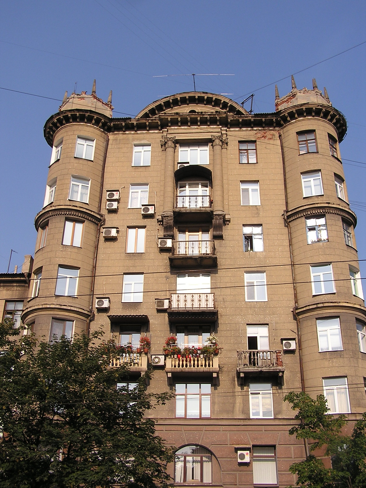 Донецк. Фасад дома по Университетской